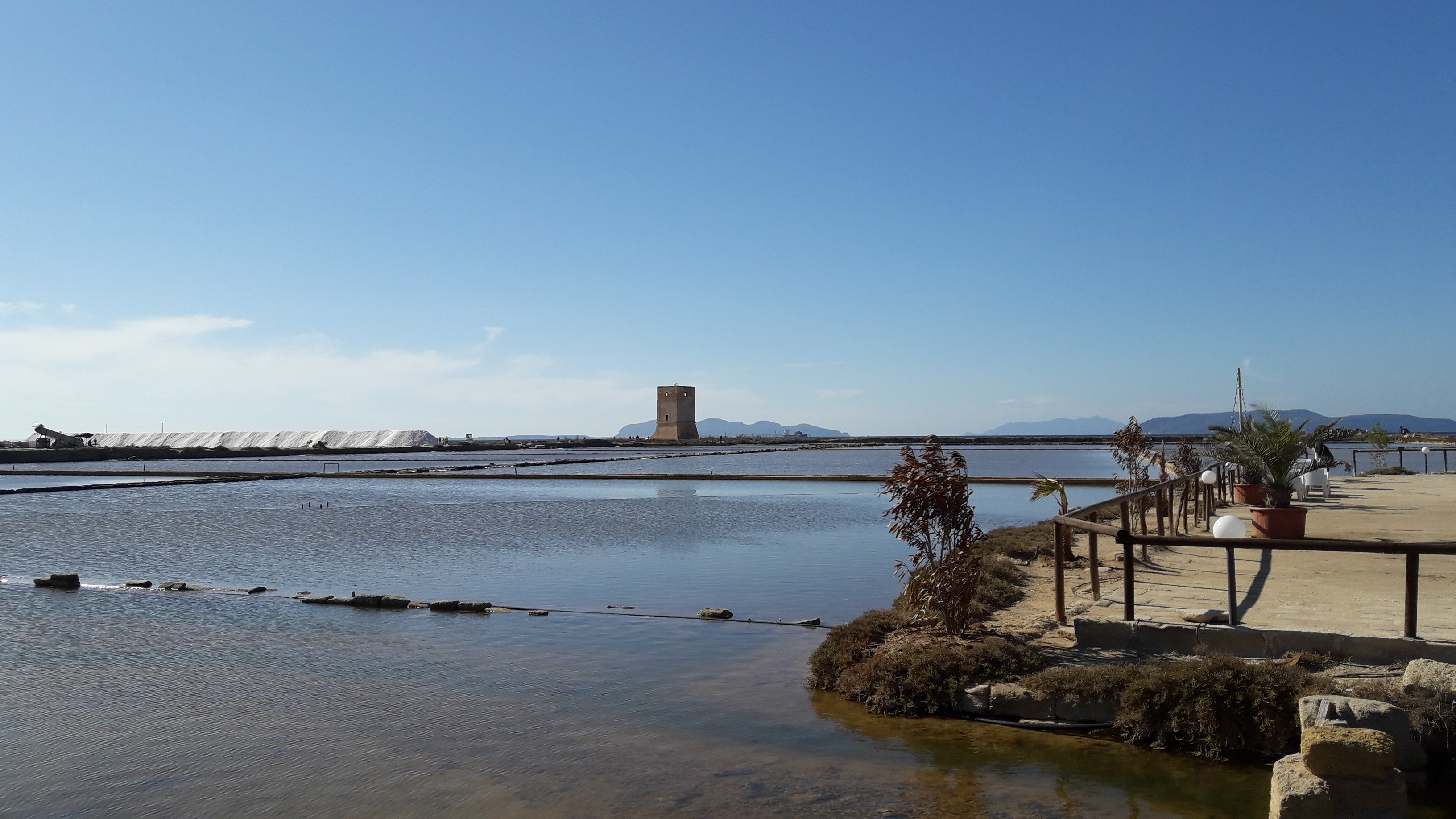 Salina Culcasi, sullo sfondo la torre di Nubia